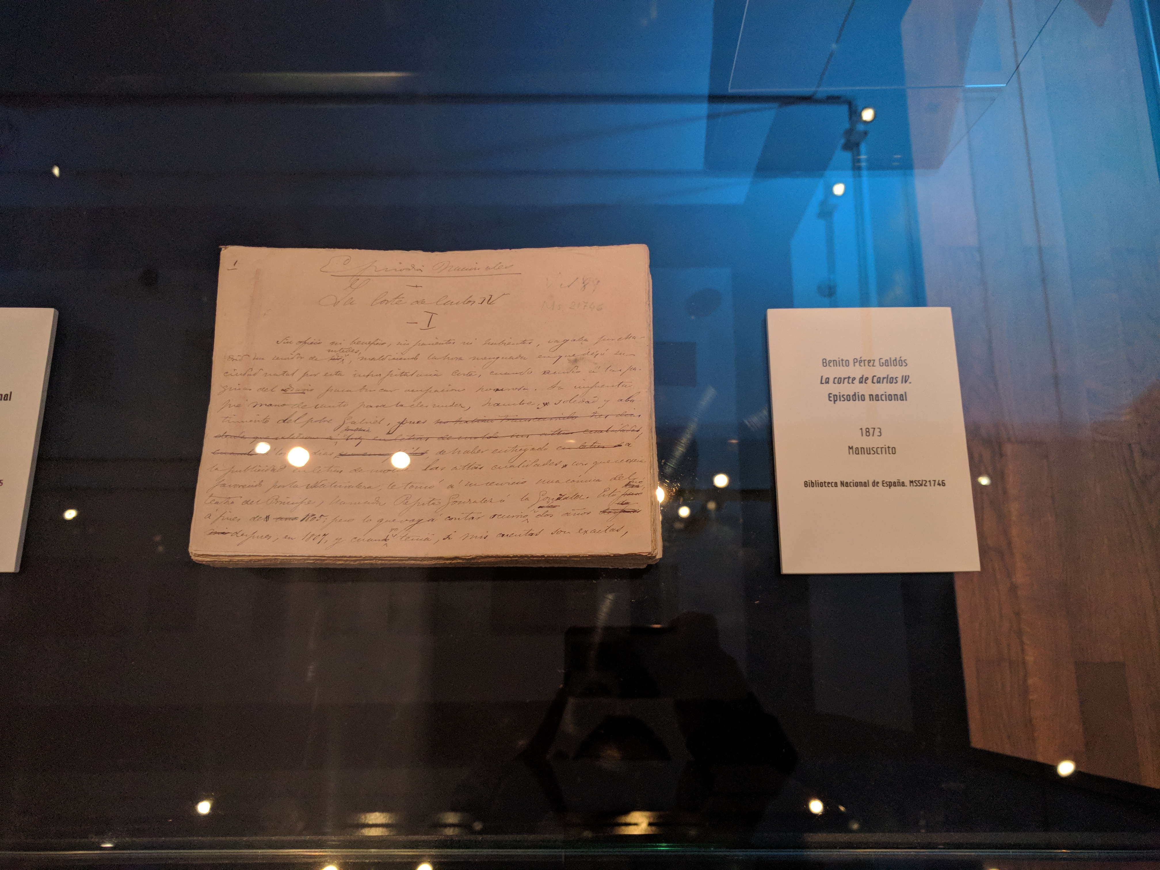 Manuscrito de La corte de Carlos IV de Benito Pérez Galdós, 1873. Biblioteca Nacional de España.